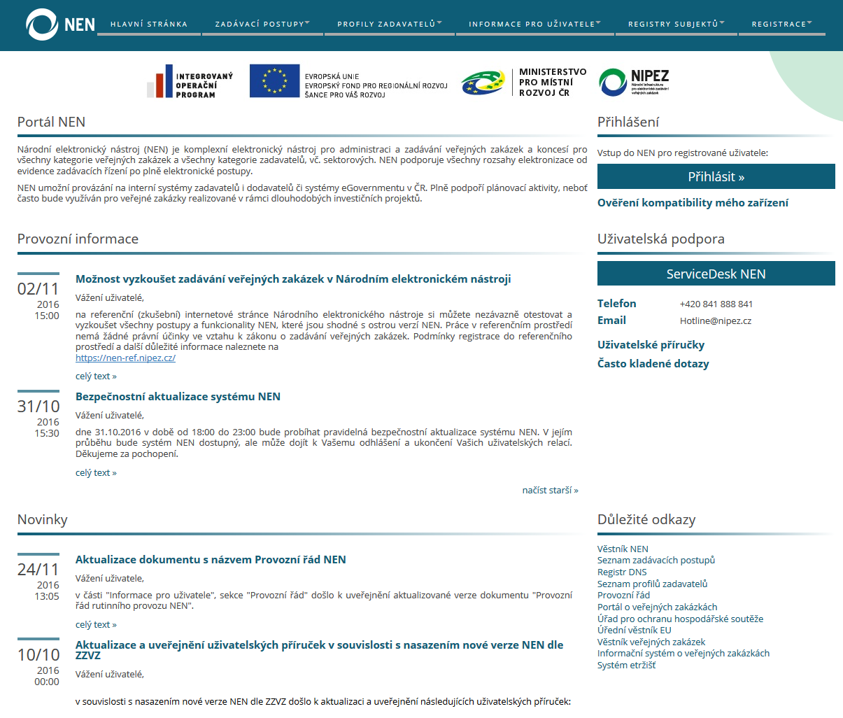 Úvodní stránka Národního elektronického nástroje